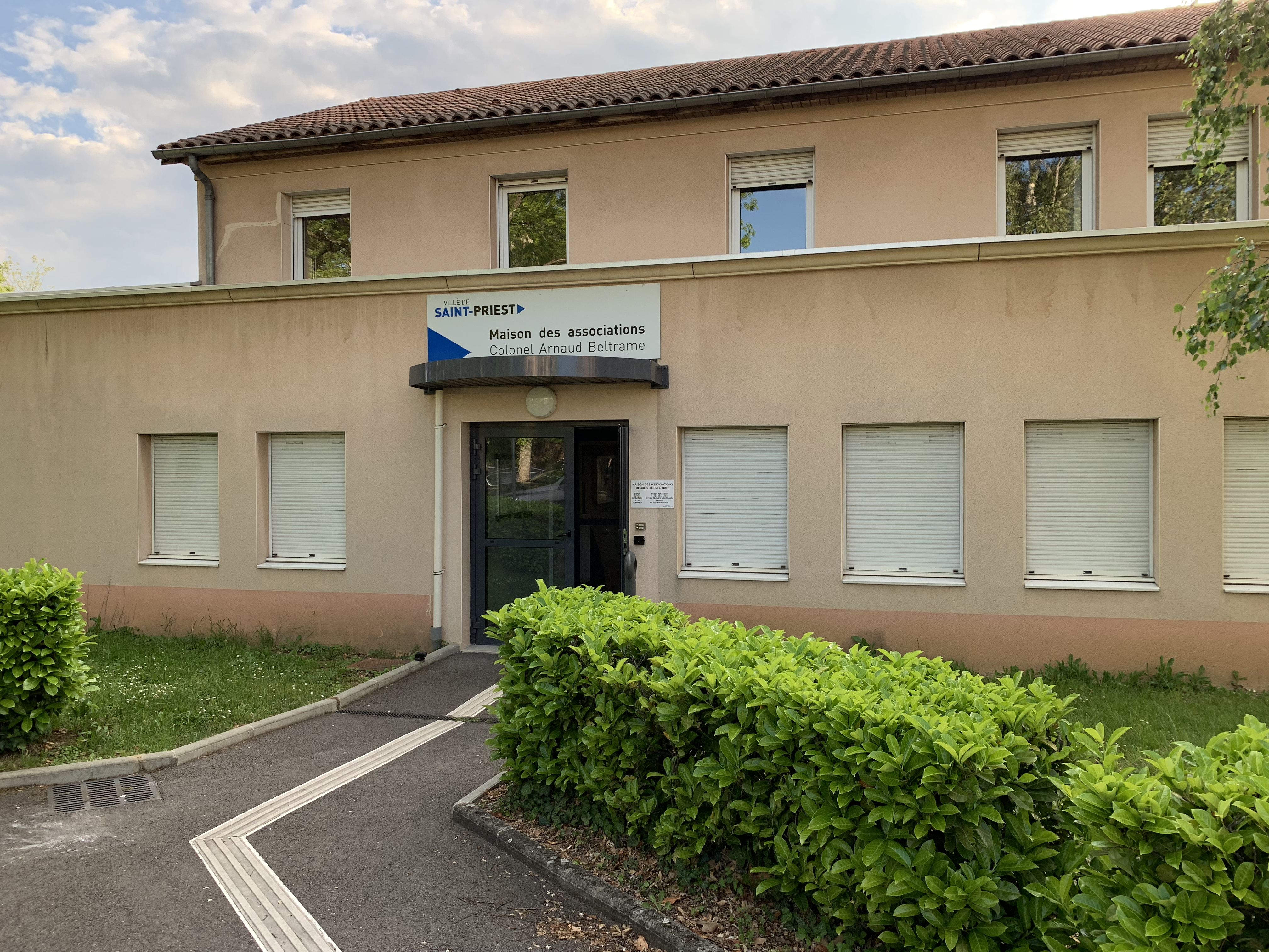 Maison des associations Colonel Arnaud Beltrame (Saint-Priest, Métropole de Lyon).